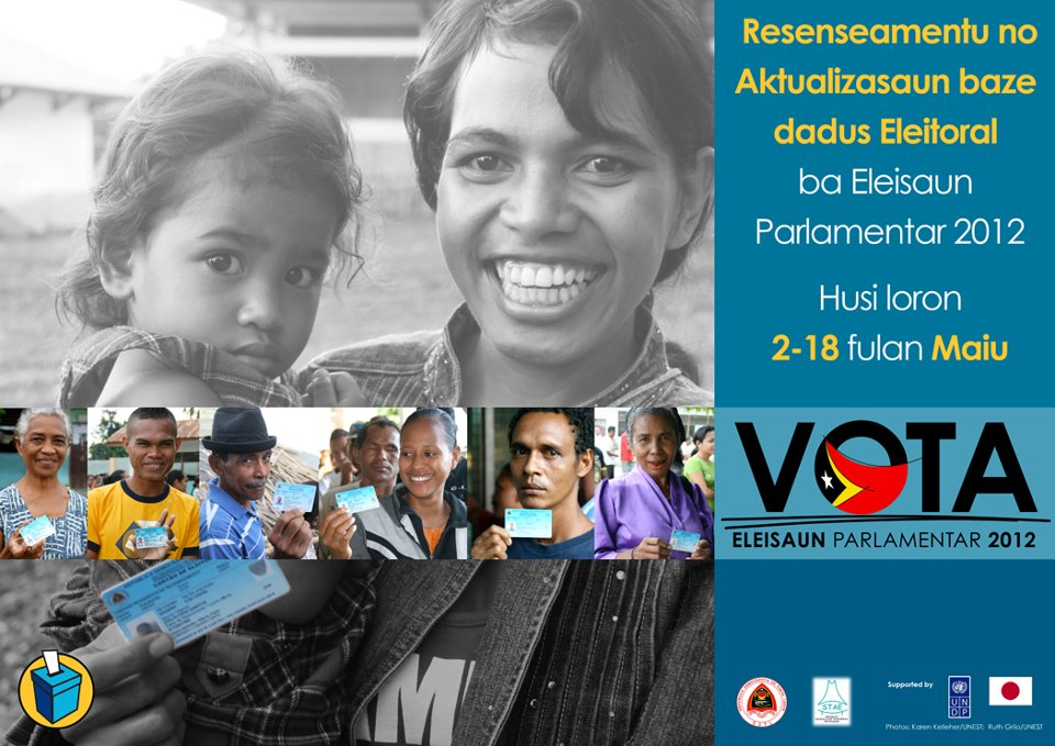 Wählerinformation zu den Parlamentwahlen in Osttimor 2012